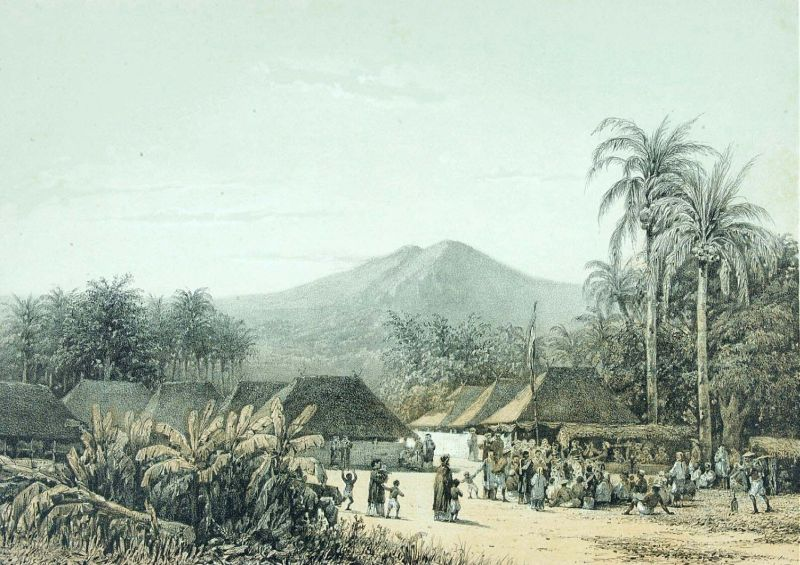 Litho. Litho naar een schilderij van A. Salm.. Een dorpsfeest in de omgeving van de berg Arjuna